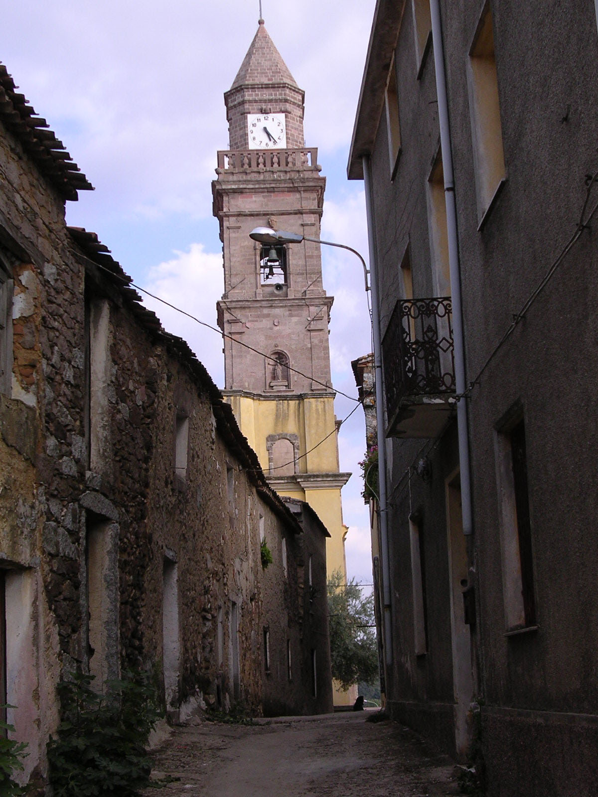 Scorcio antico di Ortueri (prov. di Nuoro) e del suo campanile. Foto personale. Primavera 2005.